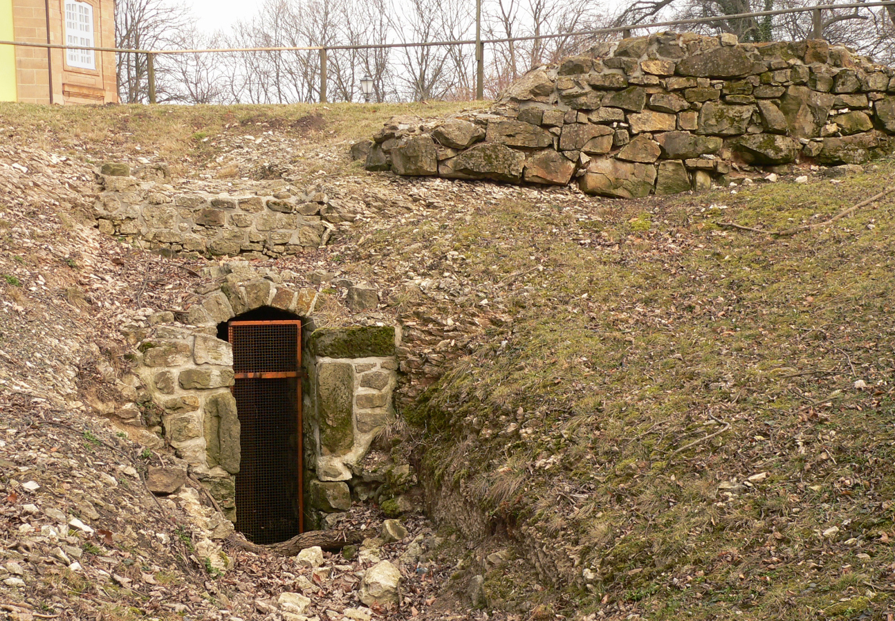 Burg Liebenburg, unterirdischer Gang